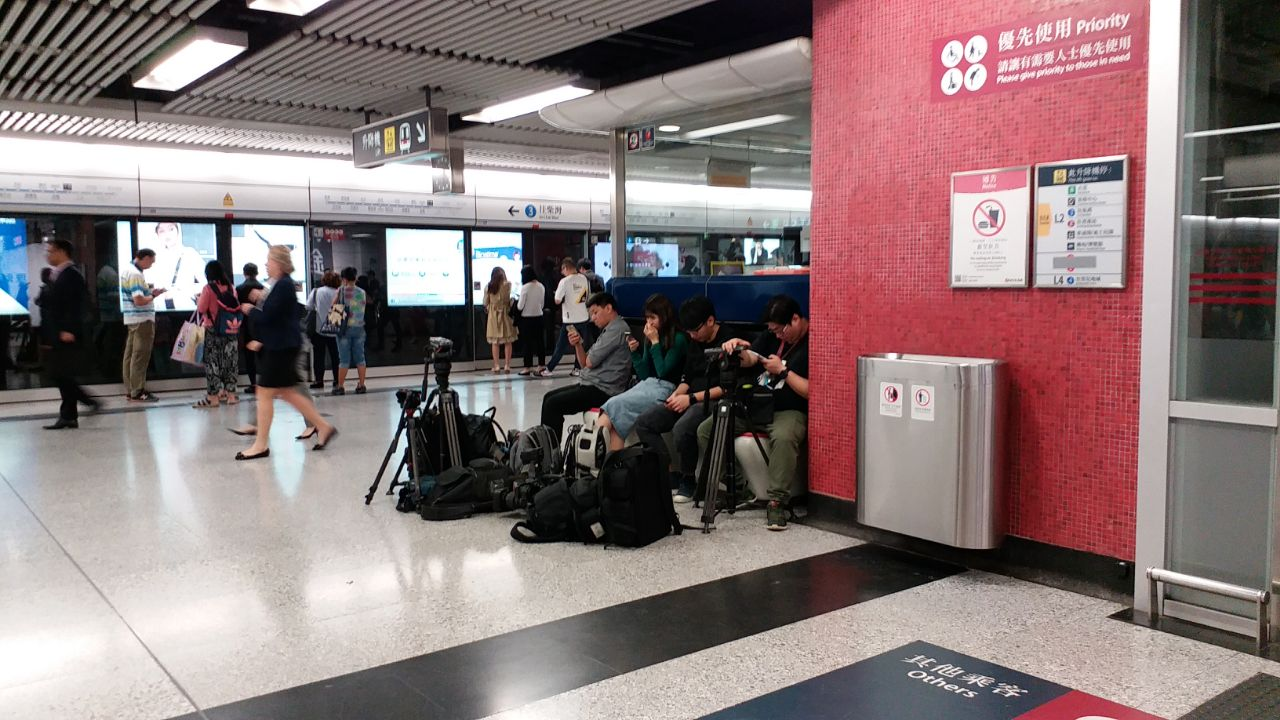 中文（香港）: 港鐵中環站列車相撞事故期間，傳媒留守在中環站港島綫3號月台，等候進一步消息。